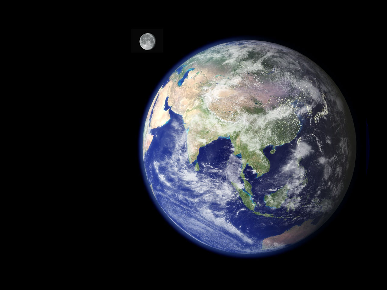 NASA image